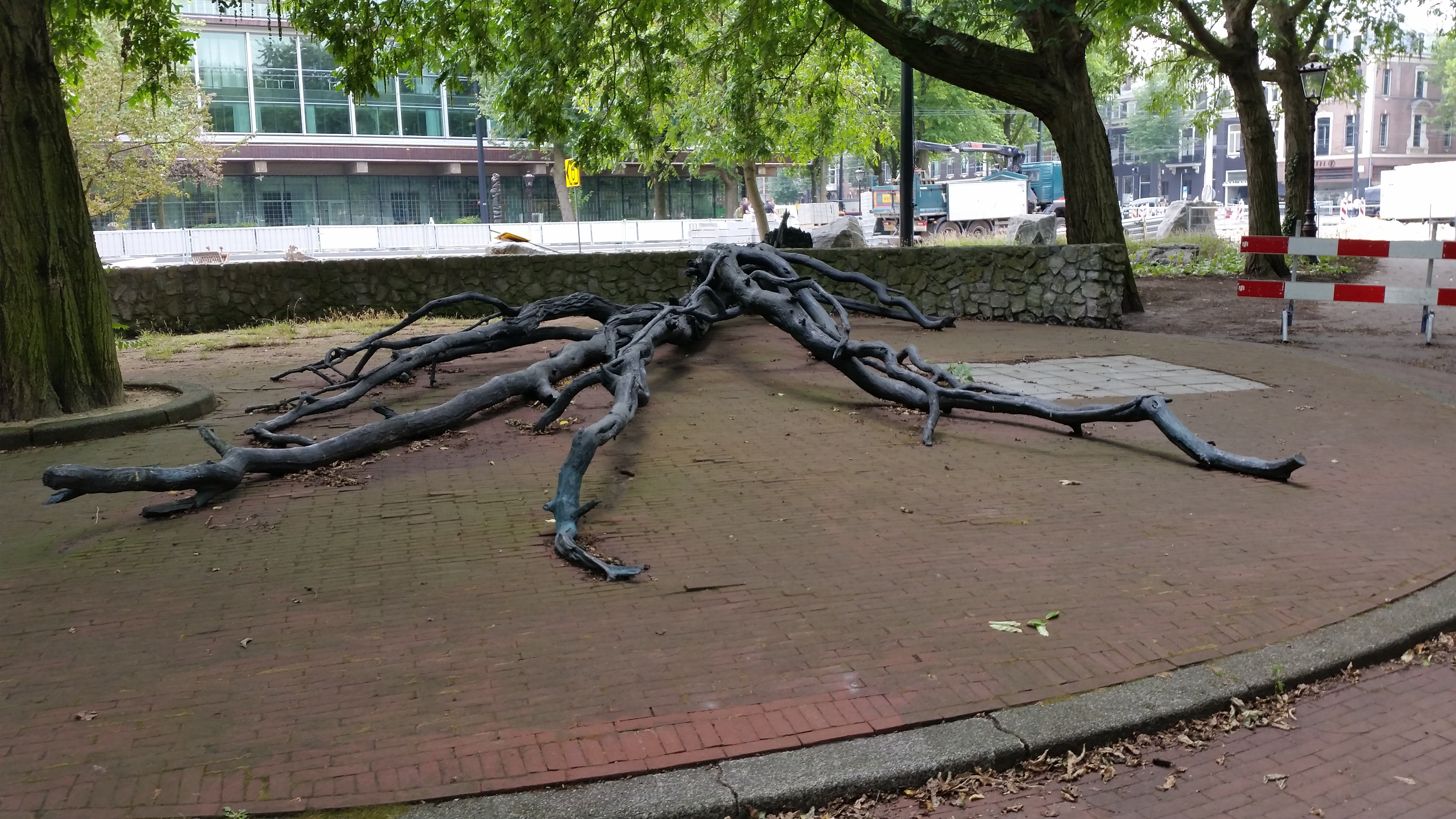 Monument Walraven van Hall, gezien vanaf de plaat